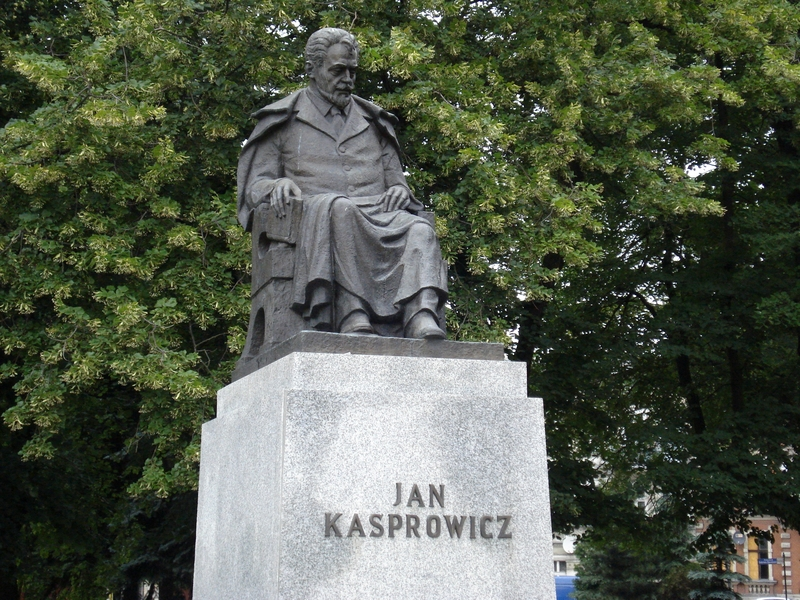 Inowrocław - pomnik Jana Kasprowicza